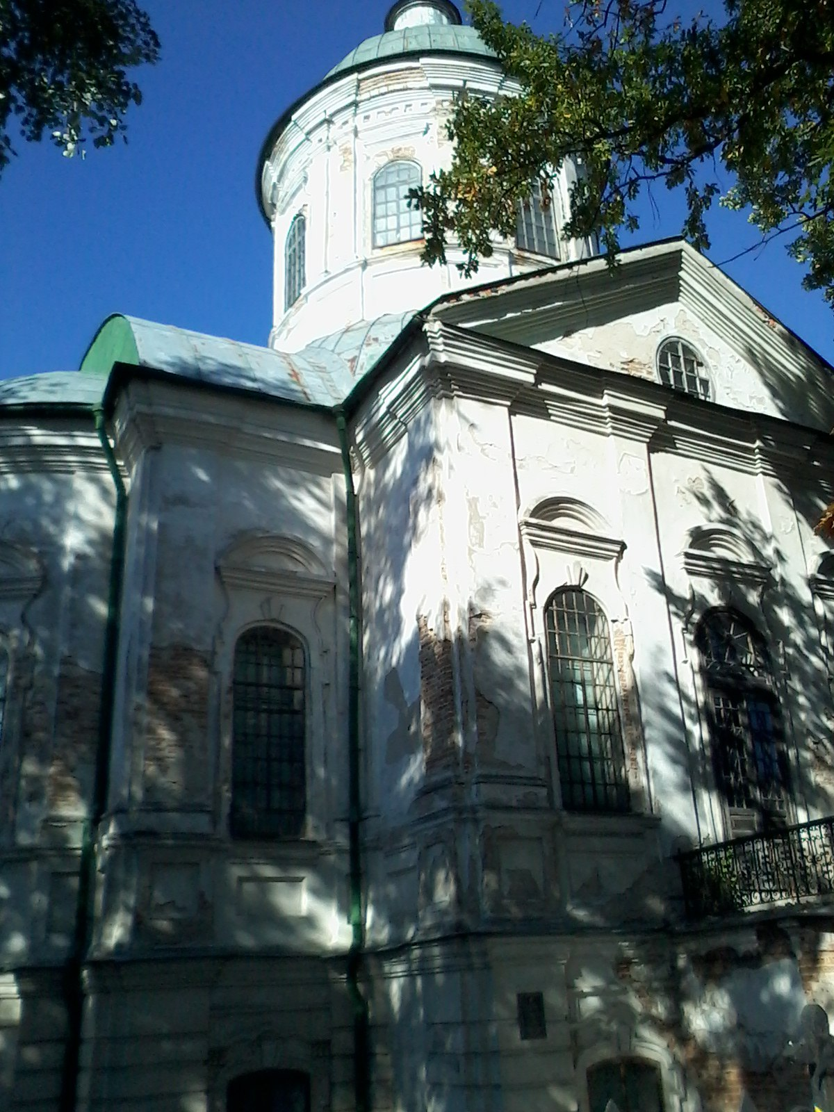 Церква Іоана Богословаі в Ніжині, (1752)